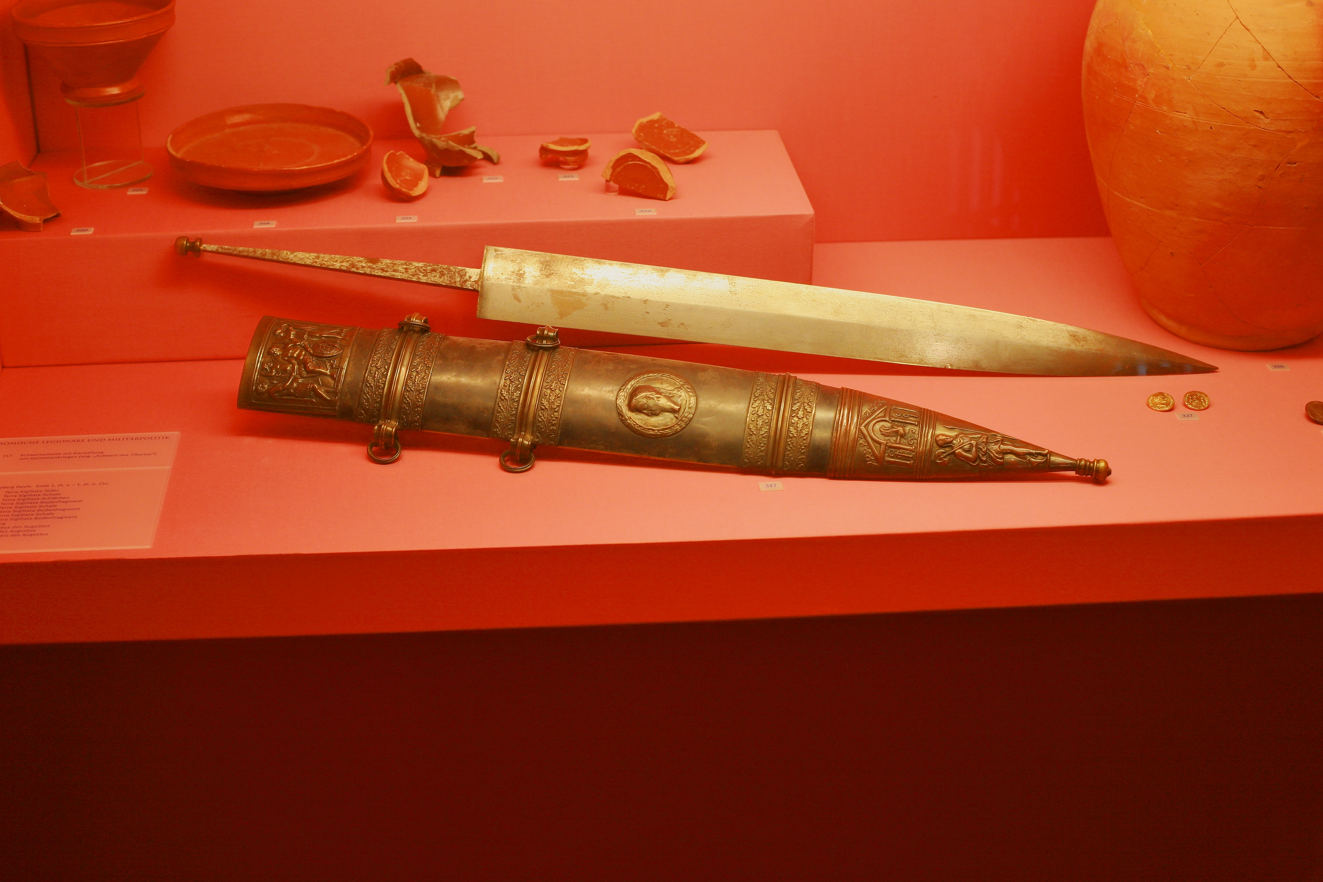 Schwertscheide eines Gladius mit Verzierungen. Replik im Museum Carnuntum. Sogenanntes "Schwert des Tiberius" aus dem frühen 1. Jahrhundert des römischen Mogontiacum. Er wurde 1848 in der Nähe des Winterhafens in der Mainzer Altstadt gefunden. Das befindet sich heute im British Museum in London.